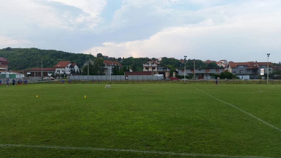 Fudbalski stadion Leštane u Leštanima